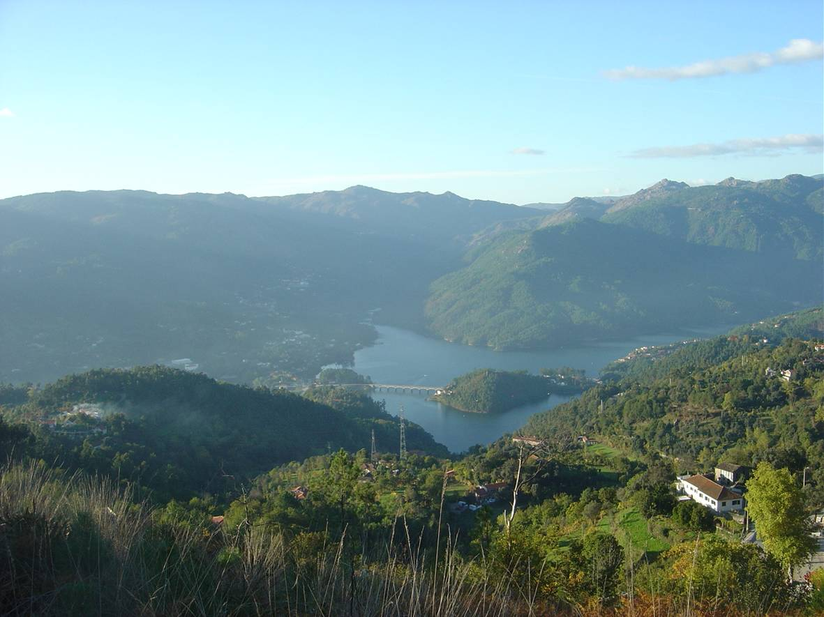 Vista sobre a barragem da Caniçada - Freguesia da Ventosa